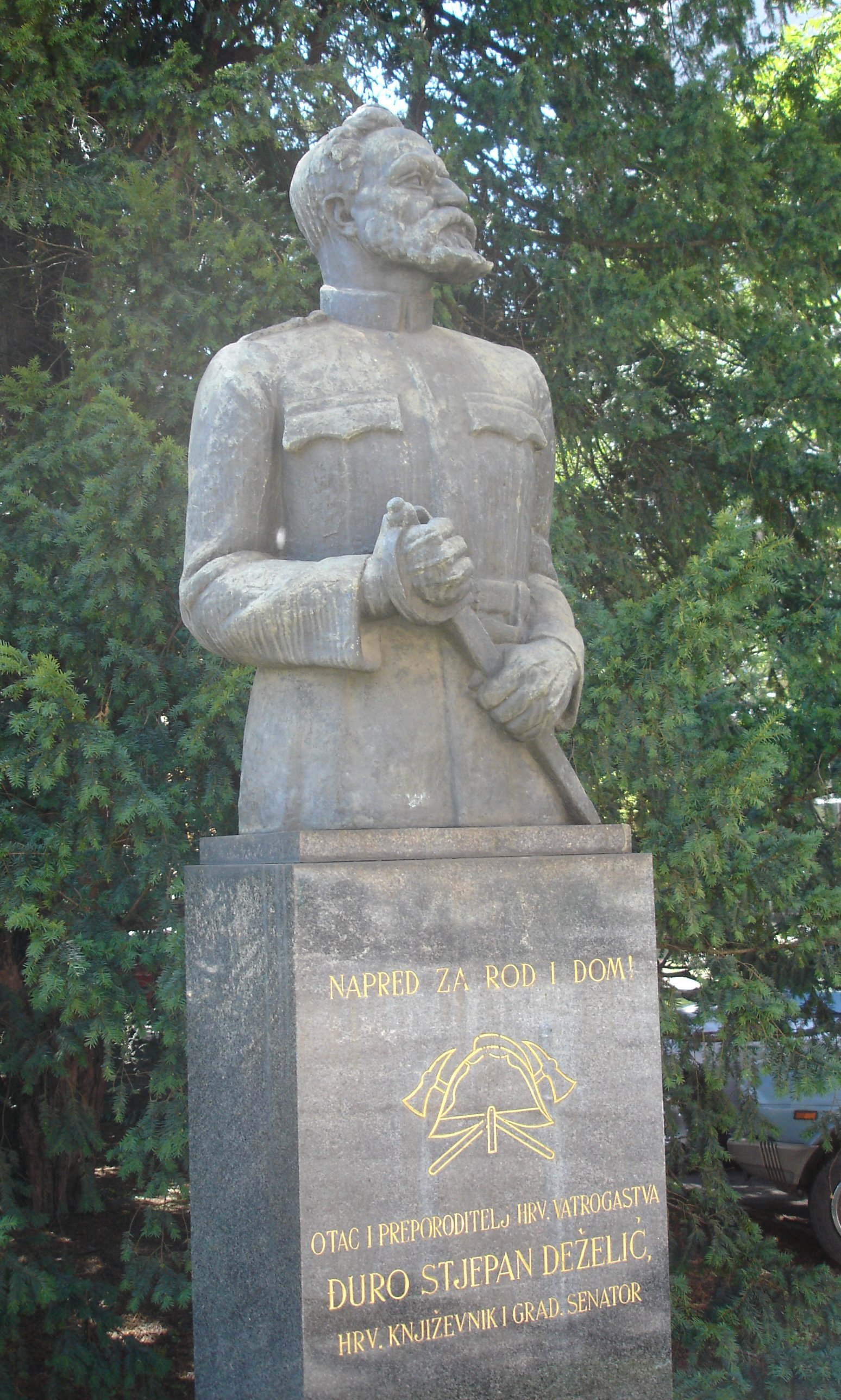 Monument for Đuro Deželić in Zagreb